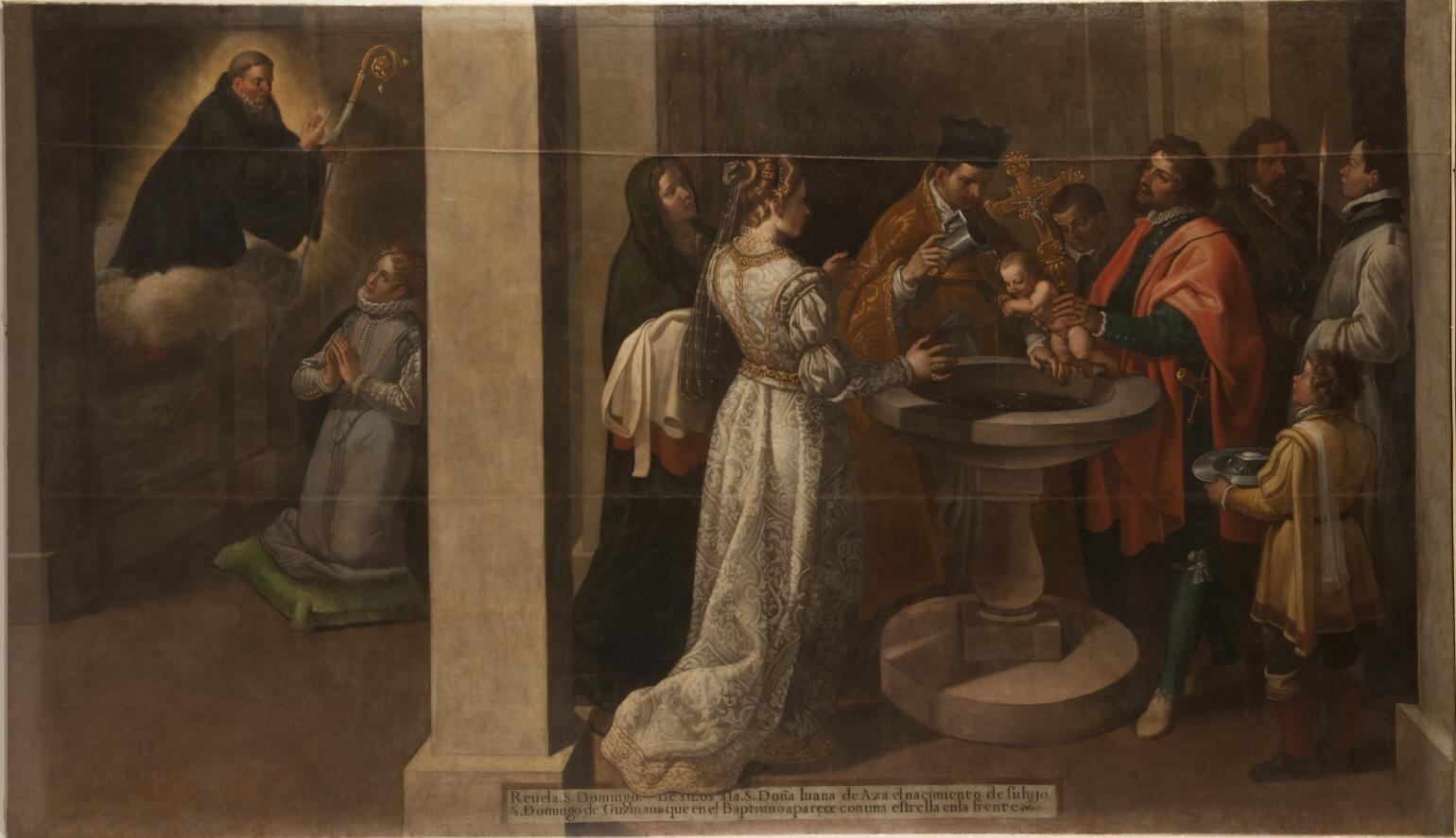 La obra representa dos pasajes de la vida de Santo Domingo de Guzman, el fundador de la Orden de los dominicos.